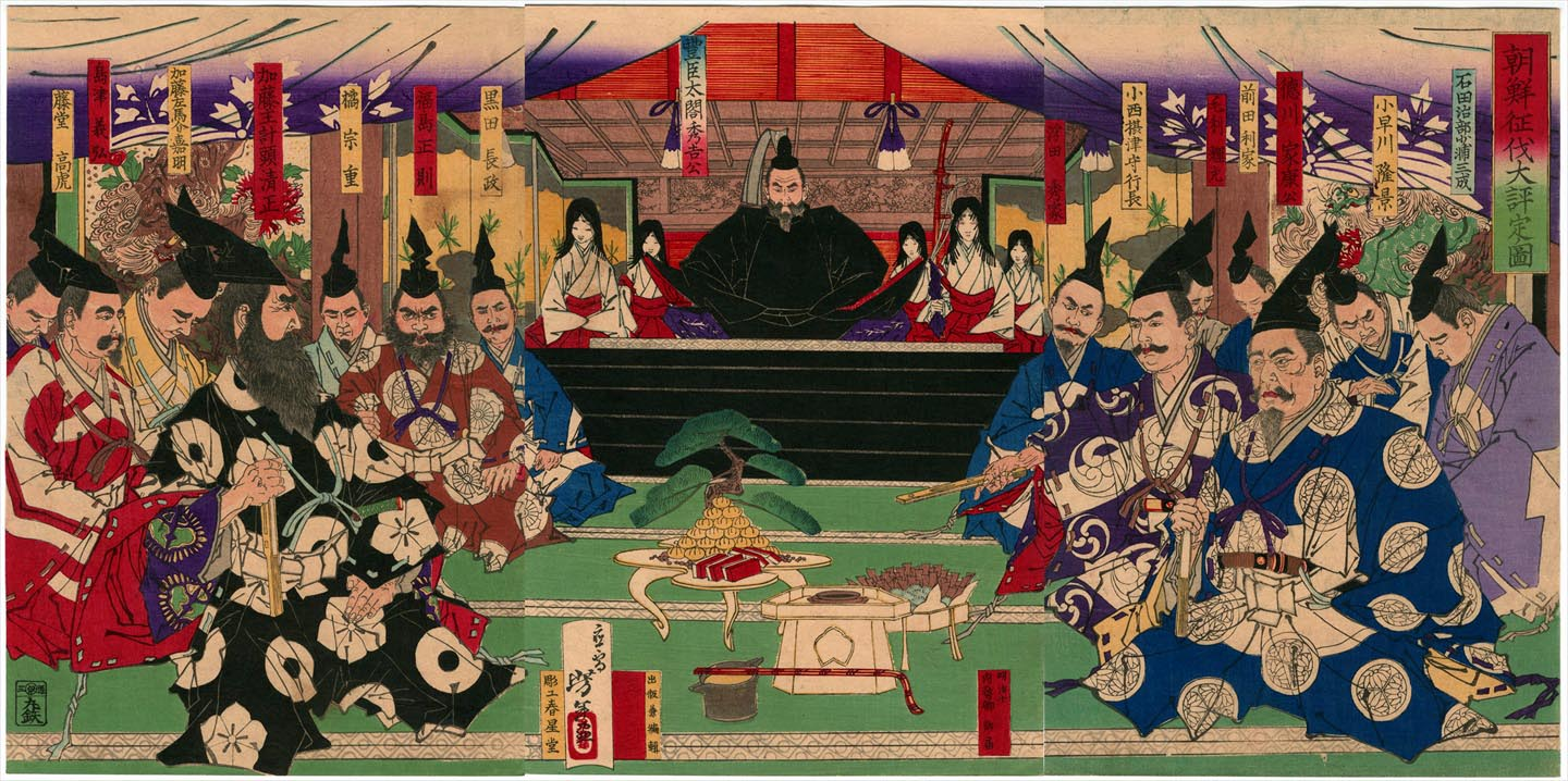 『朝鮮征伐大評定ノ図』 1877年作